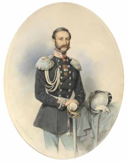 Князь Кропоткин Алексей Иванович (1816-1903), свиты генерал-майор, московский обер-полицмейстер в 1858-1860-х гг., отставной генерал-лейтенант, Лужский и Казанский уездный предводитель дворянства.